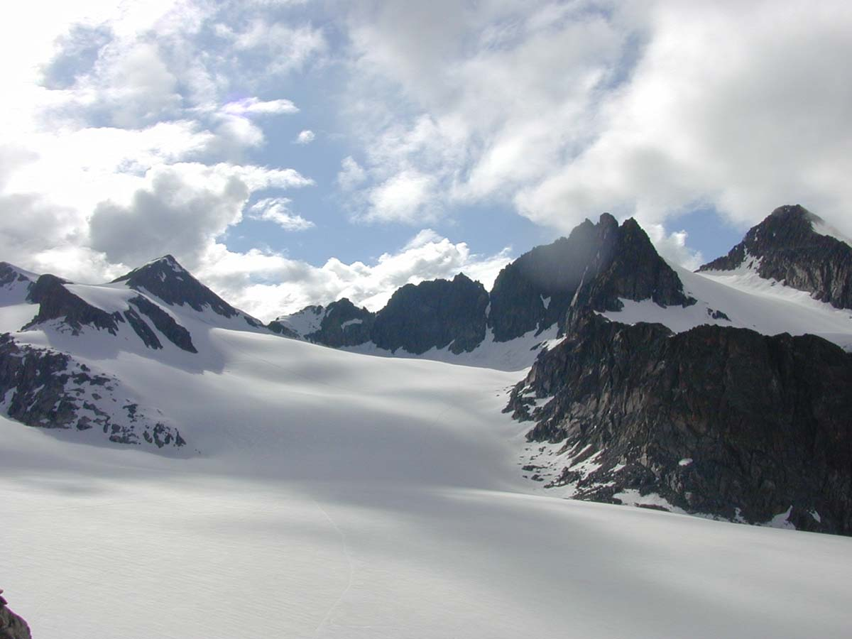 Stubai Alps: R to L: Lisenser FernerKogel, RotgratSpitze and Lisenser Spitze.